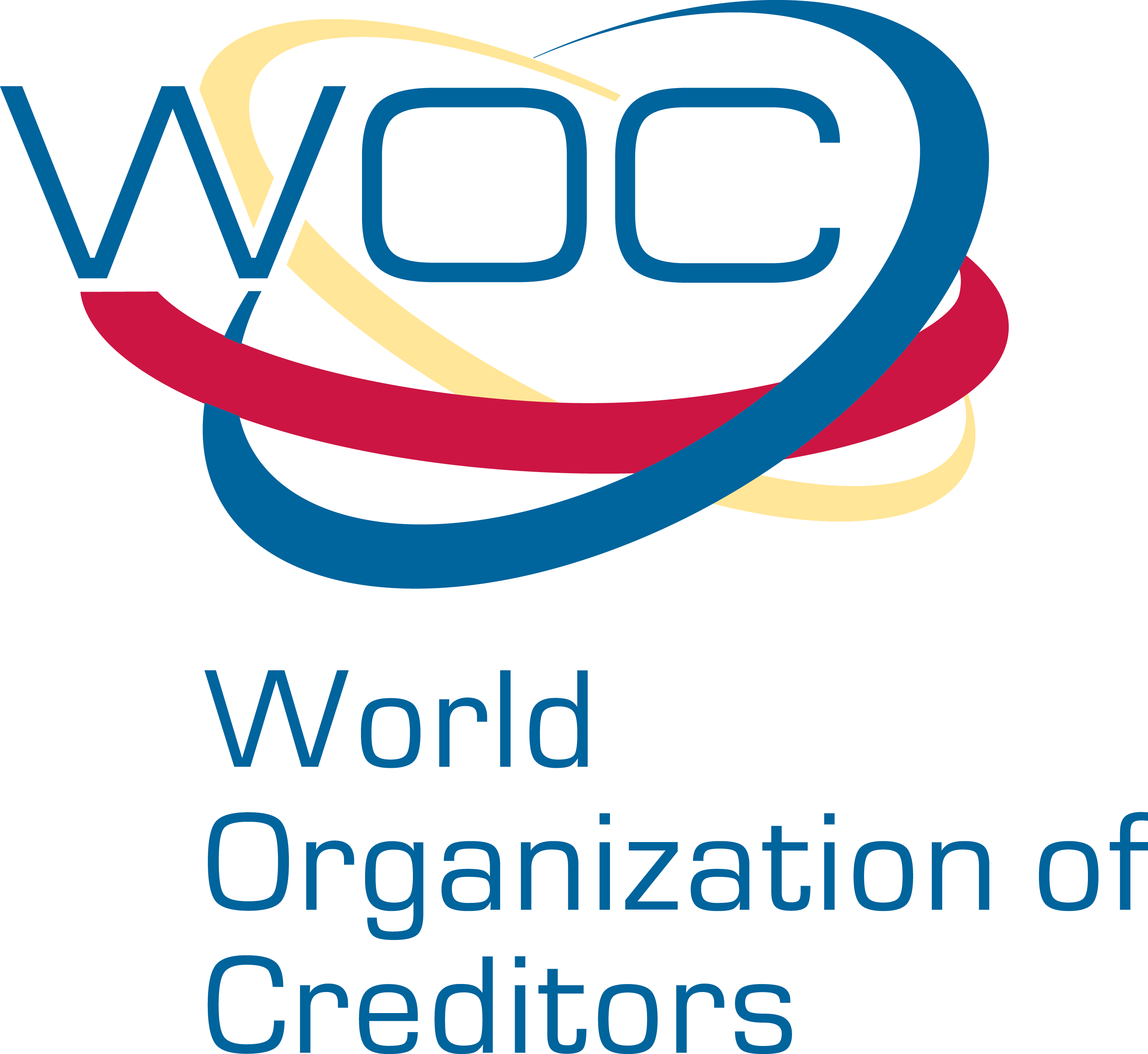 Логотип Некоммерческого партнерства по объединению кредиторов «Международная Организация Кредиторов»